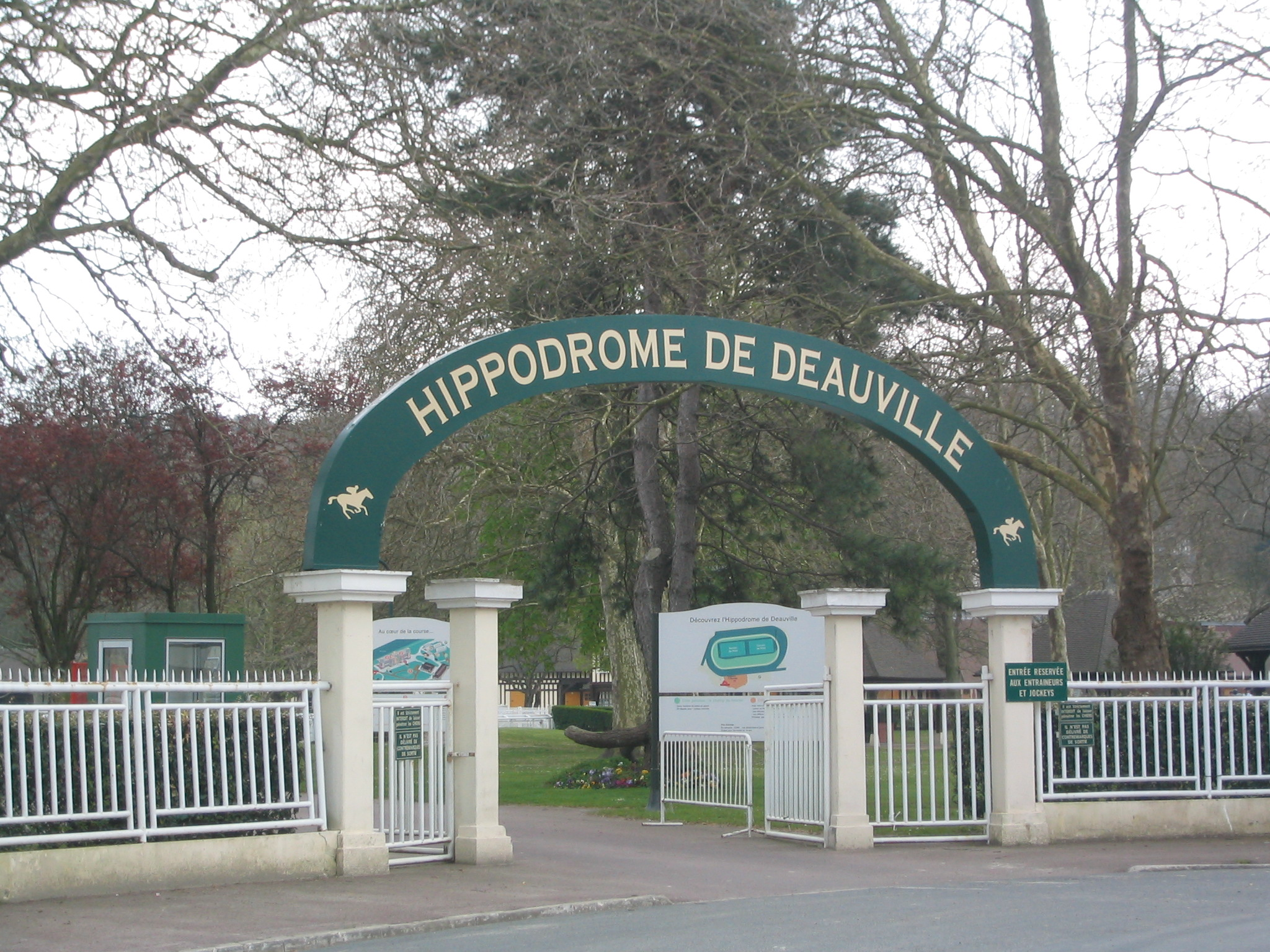 L'entrée de l'hippodrome de Deauville-Clairefontaine (Calvados, France), sur la commune de Tourgéville